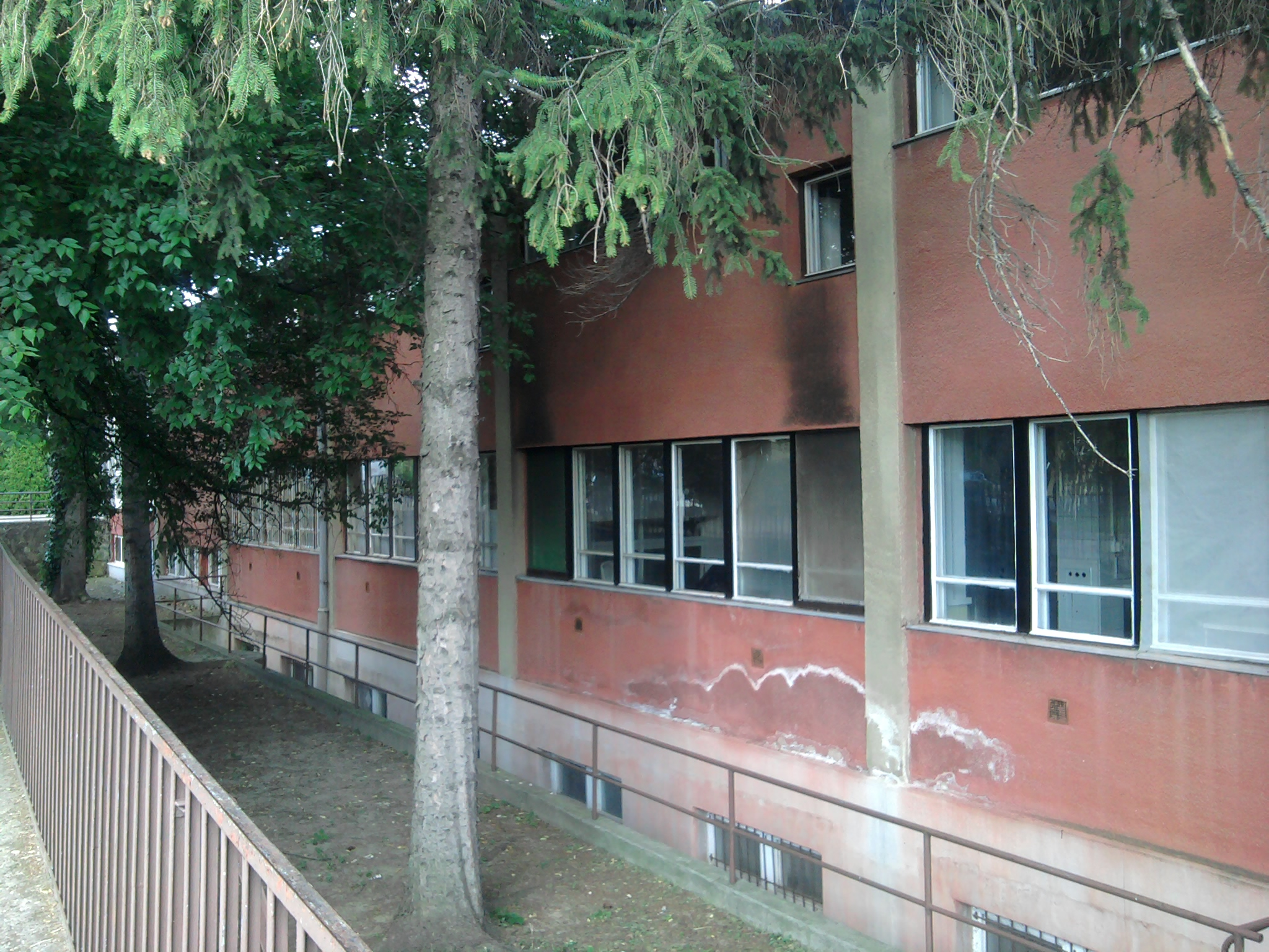 Nagy Sándor József Gimnázium, Budakeszi